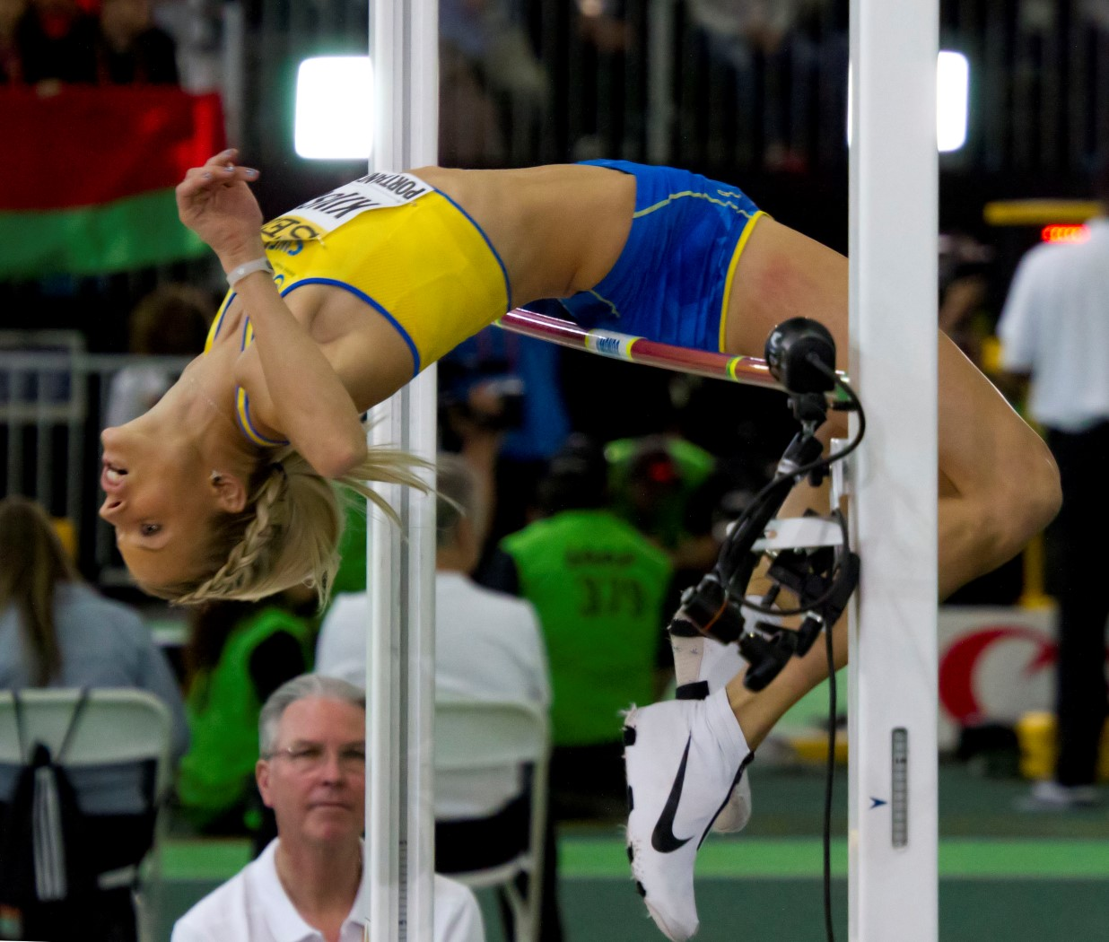 5115 kinsey